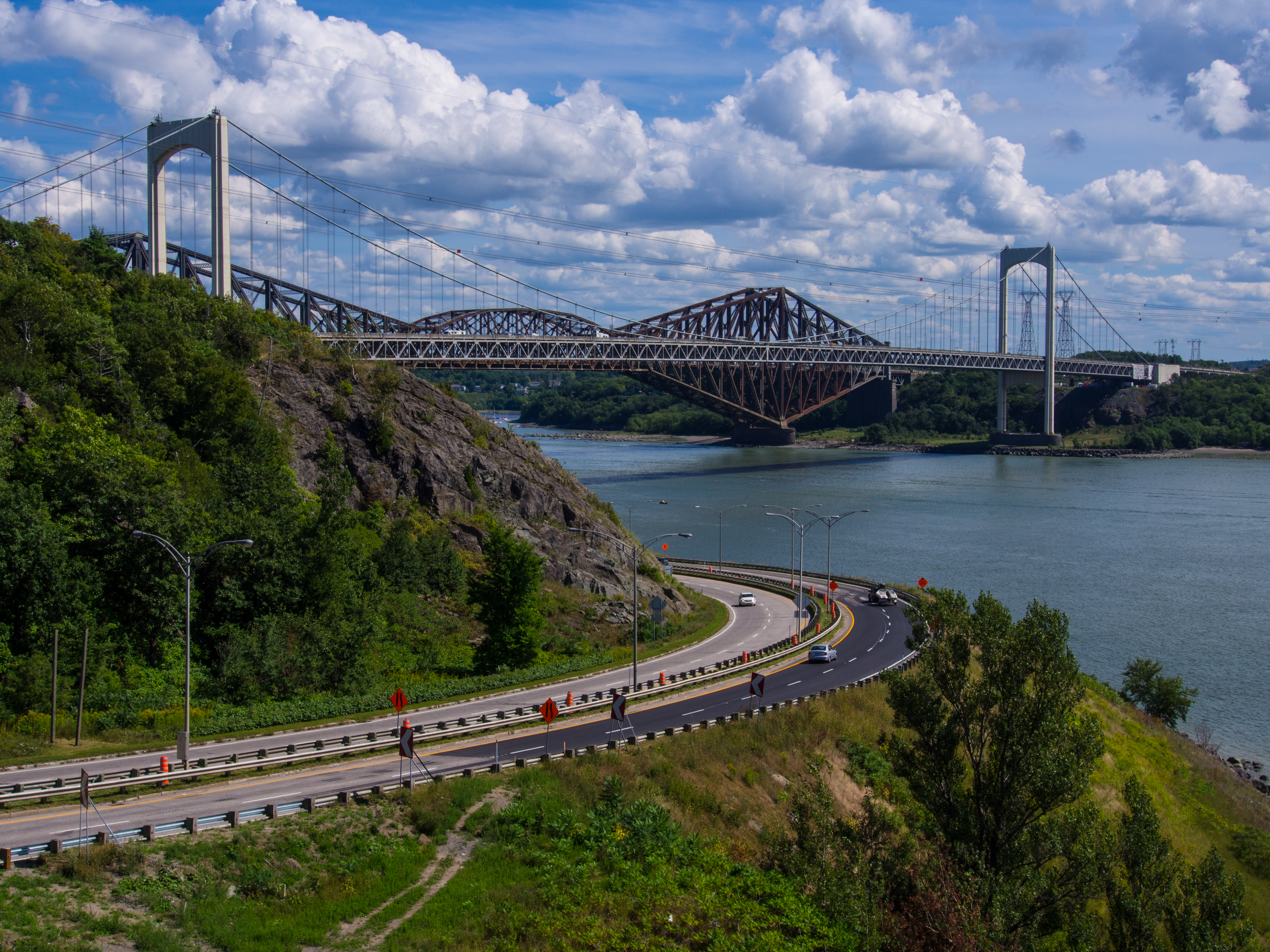 Un point de vue inhabituel de la tête des ponts